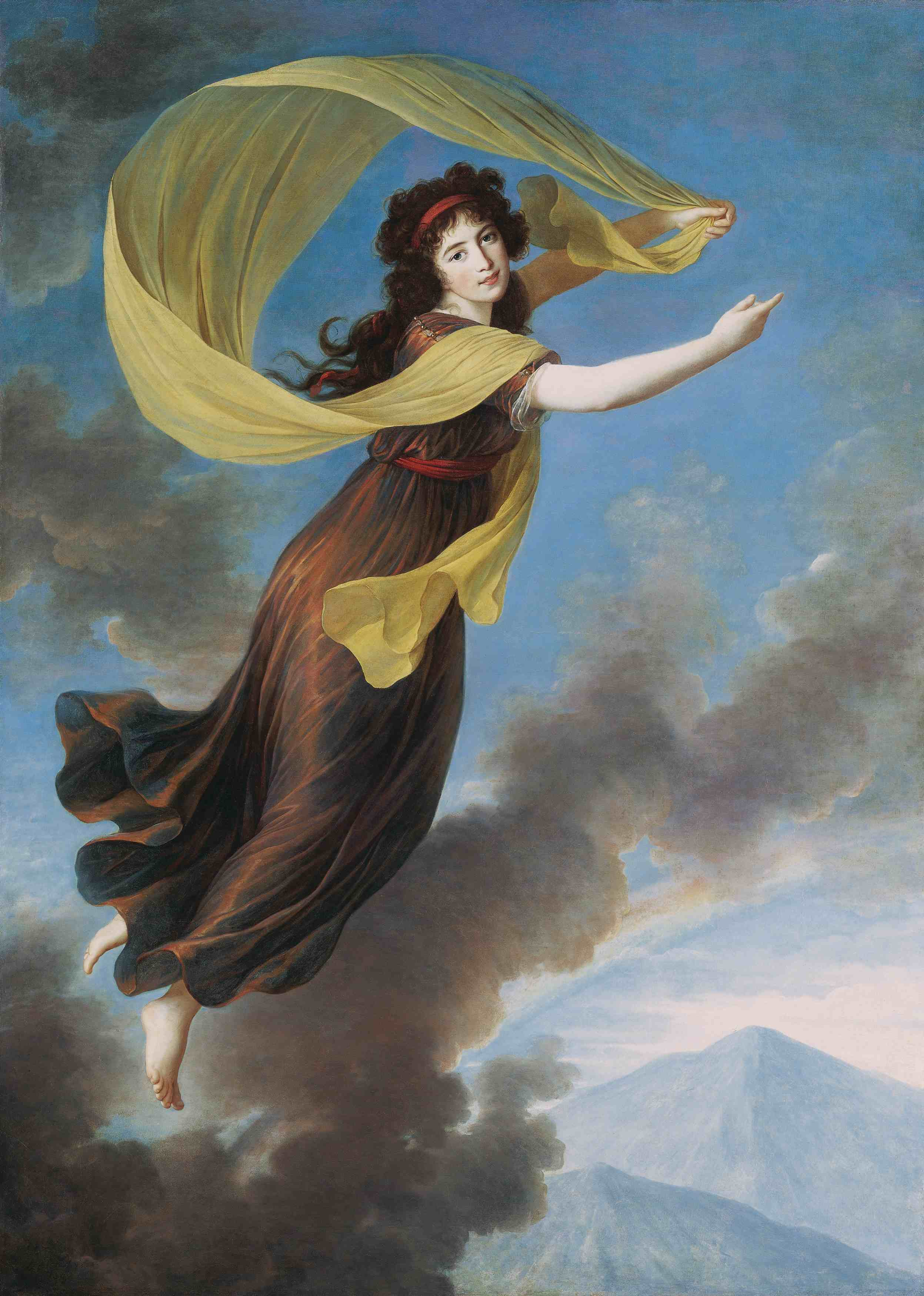 Karoline von Manderscheid-Blankenheim, princess of Liechtenstein (1768-1831), as "Iris"